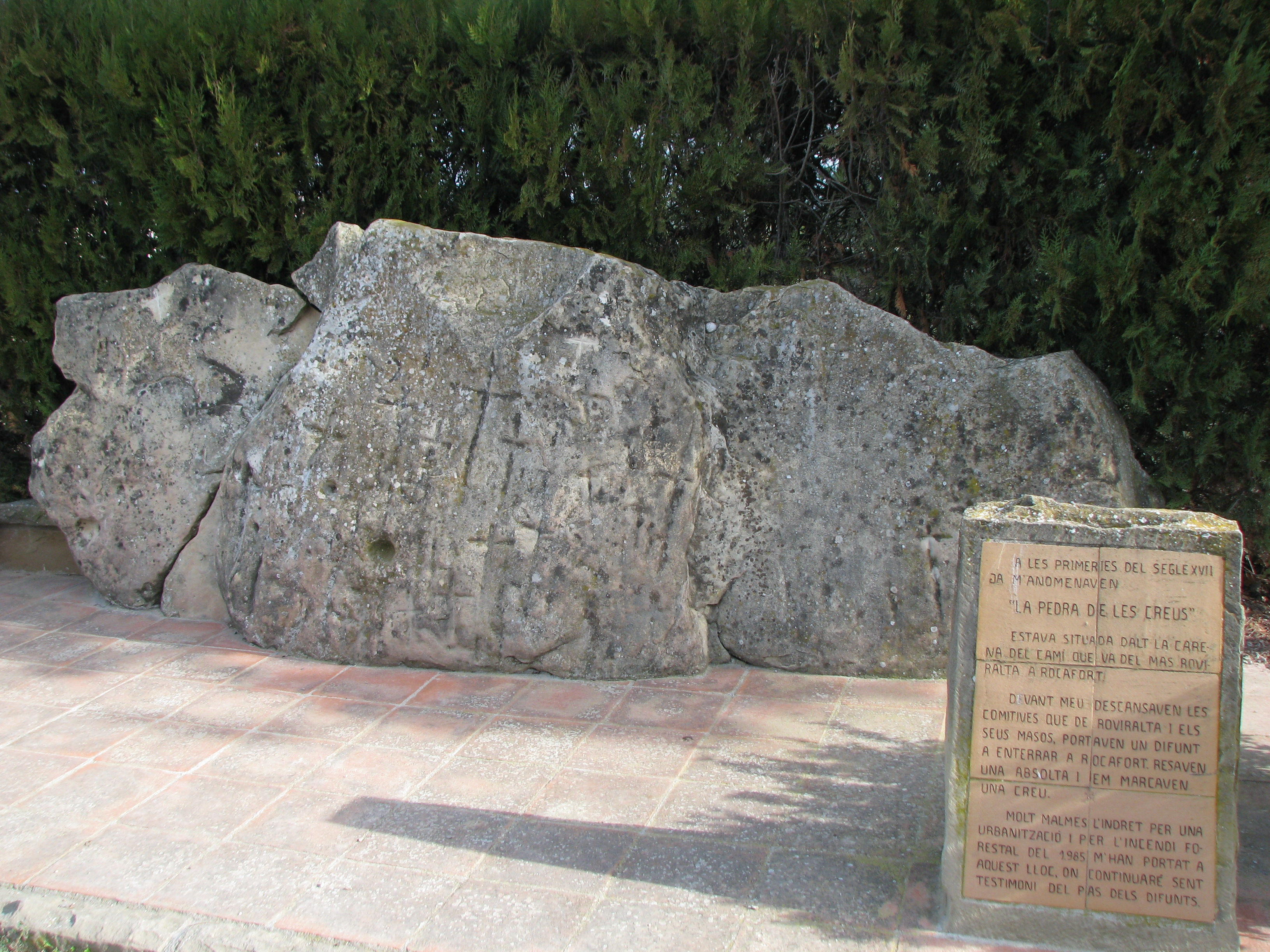 La Roca de les creus, d'origen incert, envoltada de llegenda té unes 40 creus gravades.